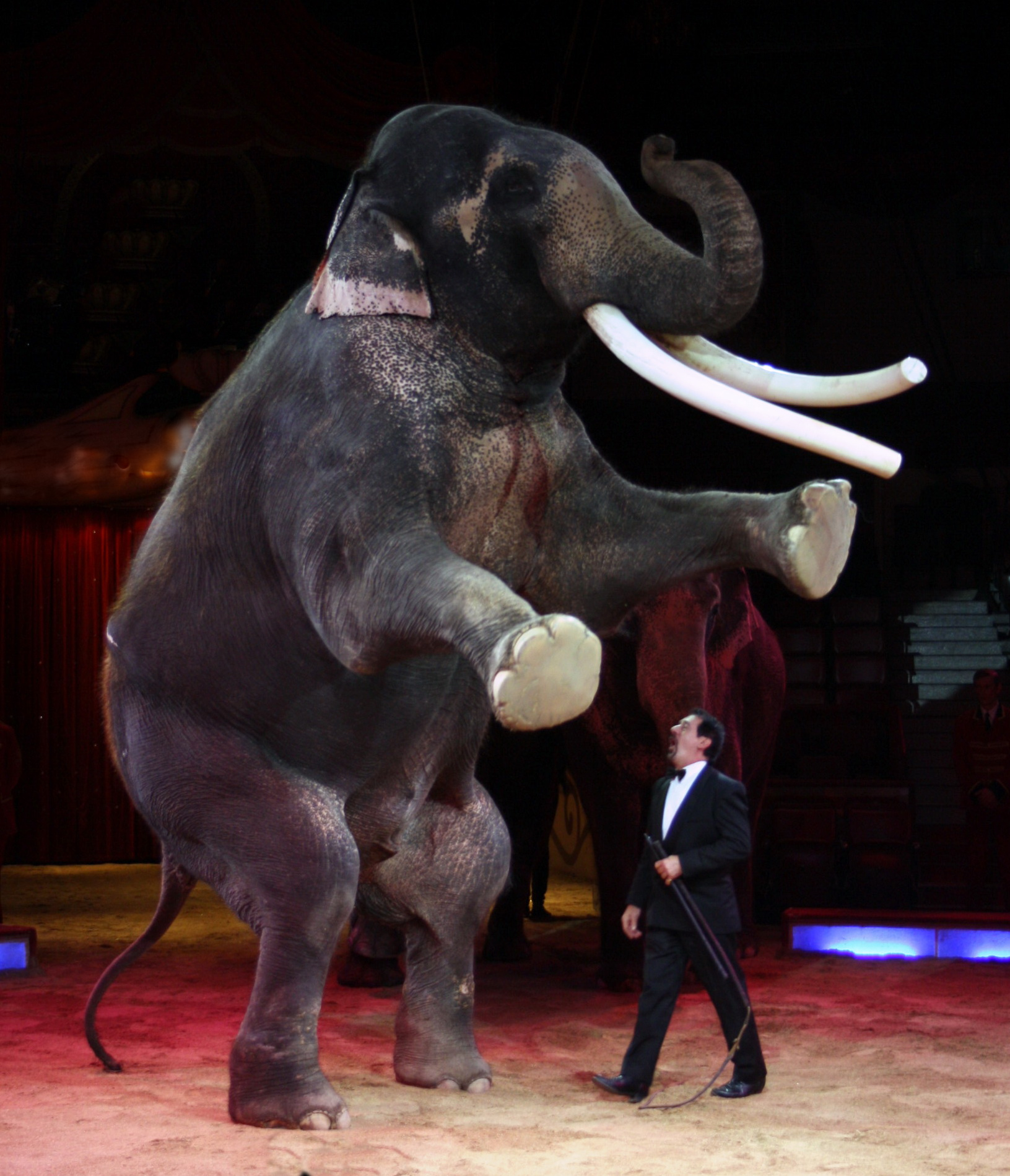 Colonel Joe, der großte Elefant der Welt. 7 Tonnen schwer. Zu sehen beim Cirkus Krone.